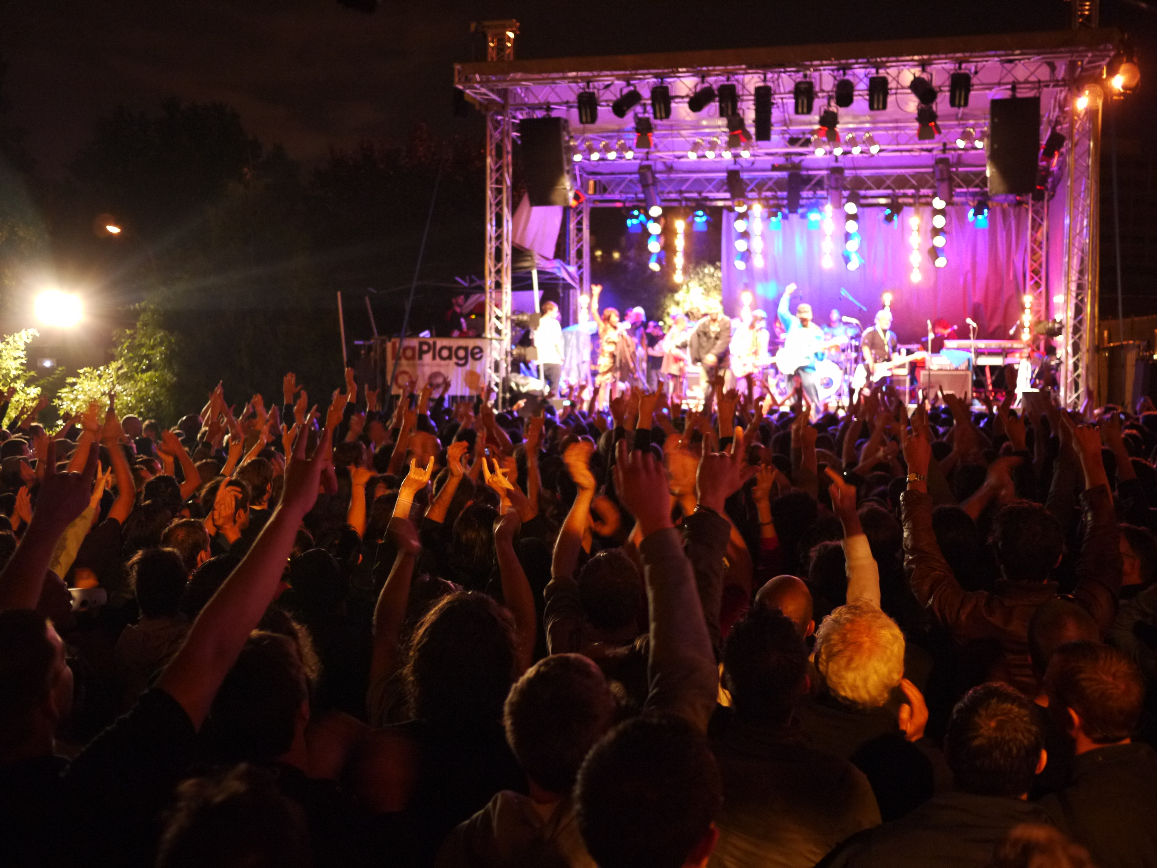 Concert à La Plage